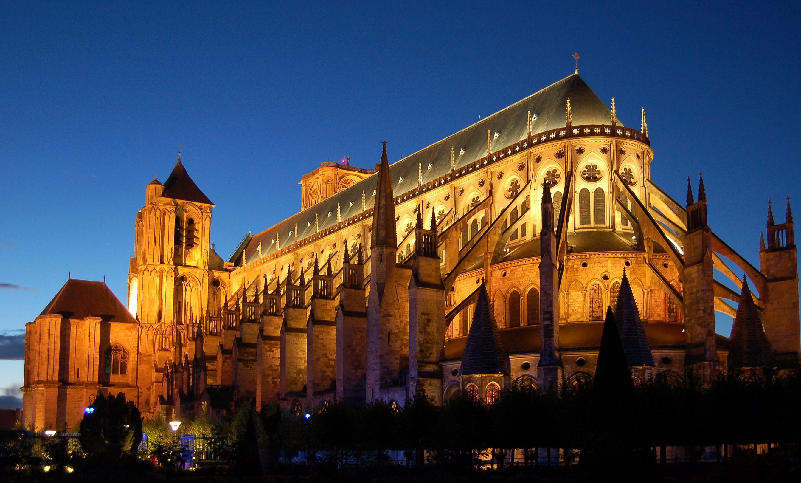 Kathedrale Saint-Etienne von Bourges bei Nacht